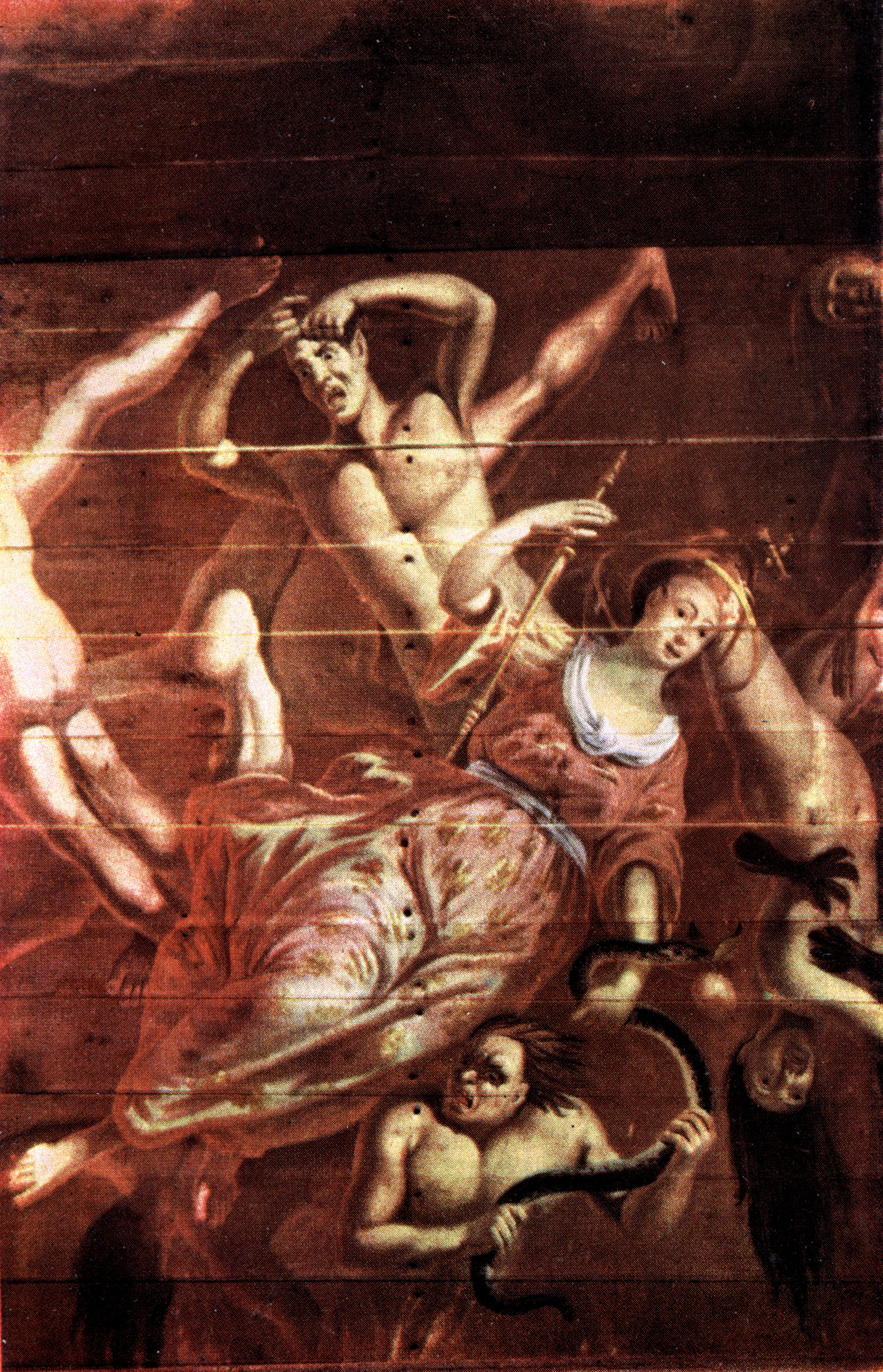 Örgryte gamla kyrka. Takmålning av Johan Ross d.ä. (1695-1773)